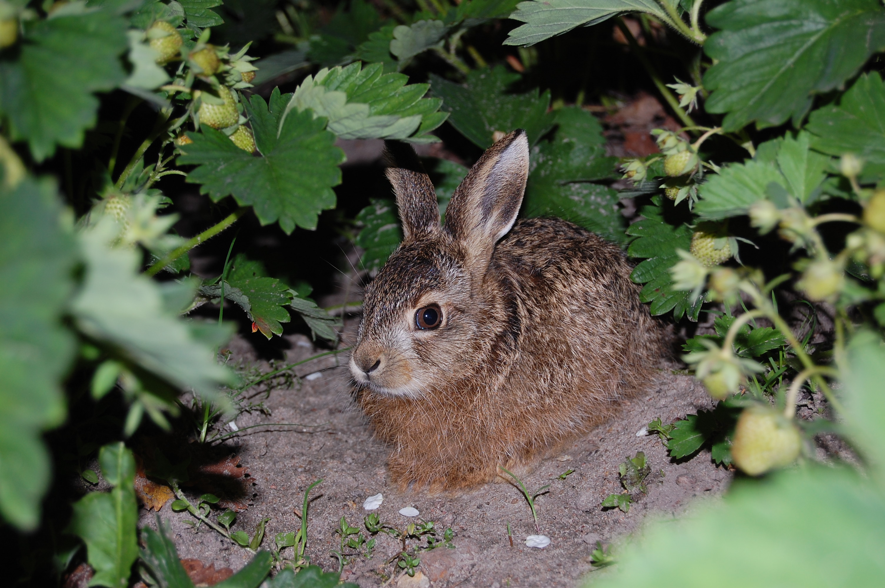 Młody zając szarak ukryty pośród dojrzewających truskawek.